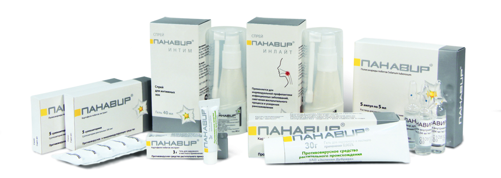 панавир